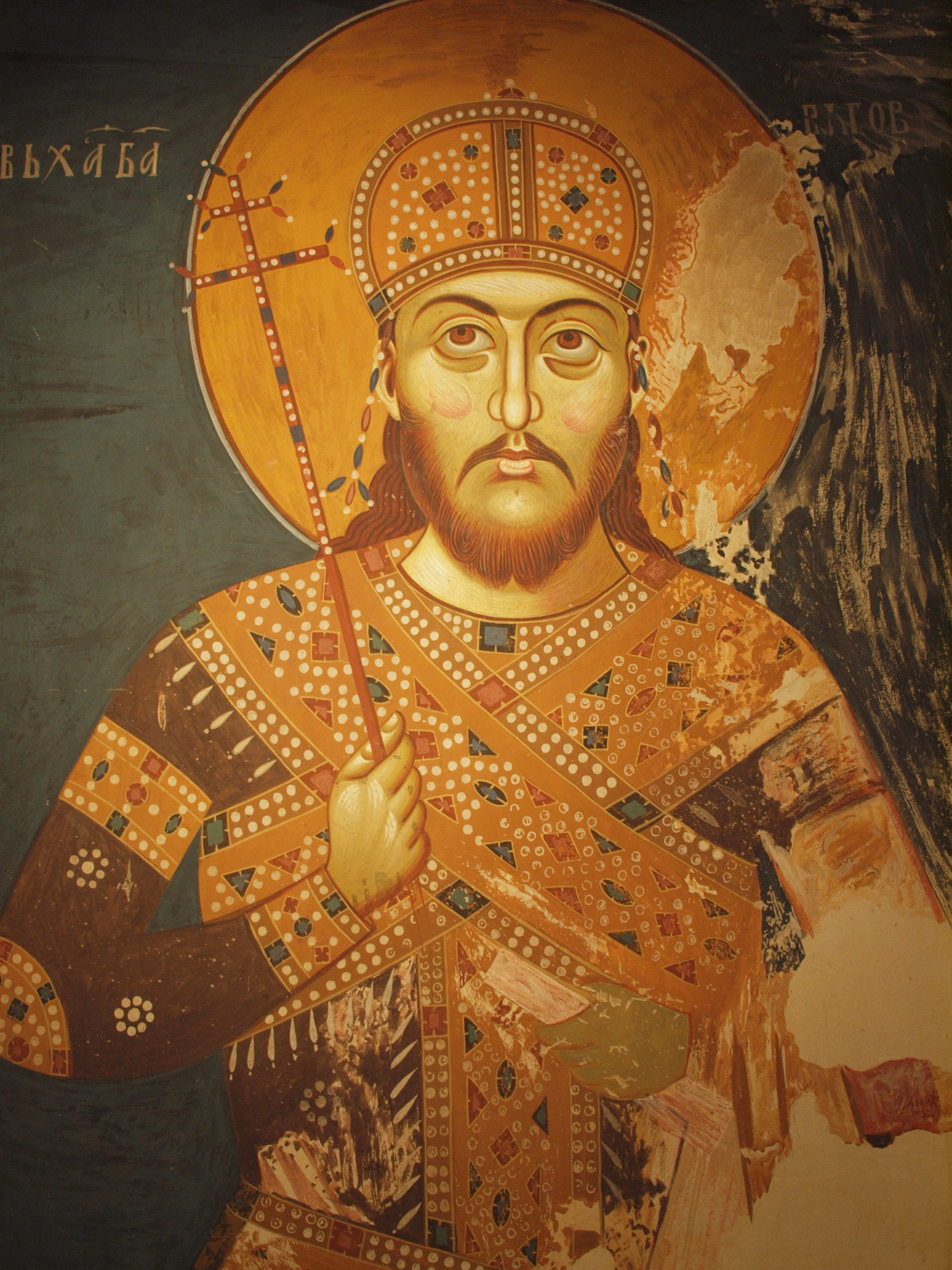 Icon